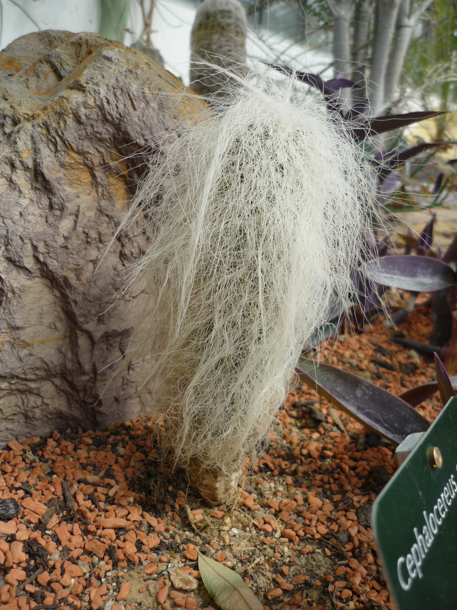 Cephalocereus senilis, jardin des plantes de Paris, France